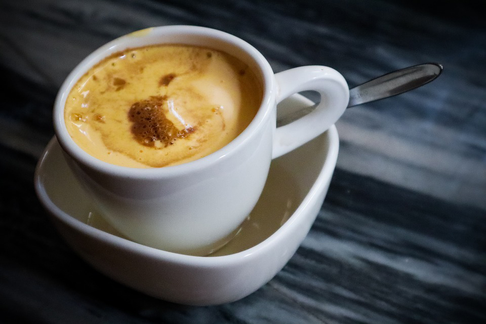 Le café à l'oeuf